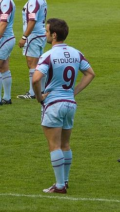 Morgan Parra affronte les Northampton Saints en finale du Challenge européen 2008-2009 avec leCS Bourgoin-Jallieu- du 22 mai 2009. Prise le 22 mai 2009. Morgan Parra